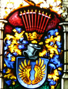 Wappen der von Erffa im Kirchenfenster der Kirche von Ahorn bei Coburg, laut Inschrift Stiftung von Hans Hartmann Freiherr von Erffa 1916